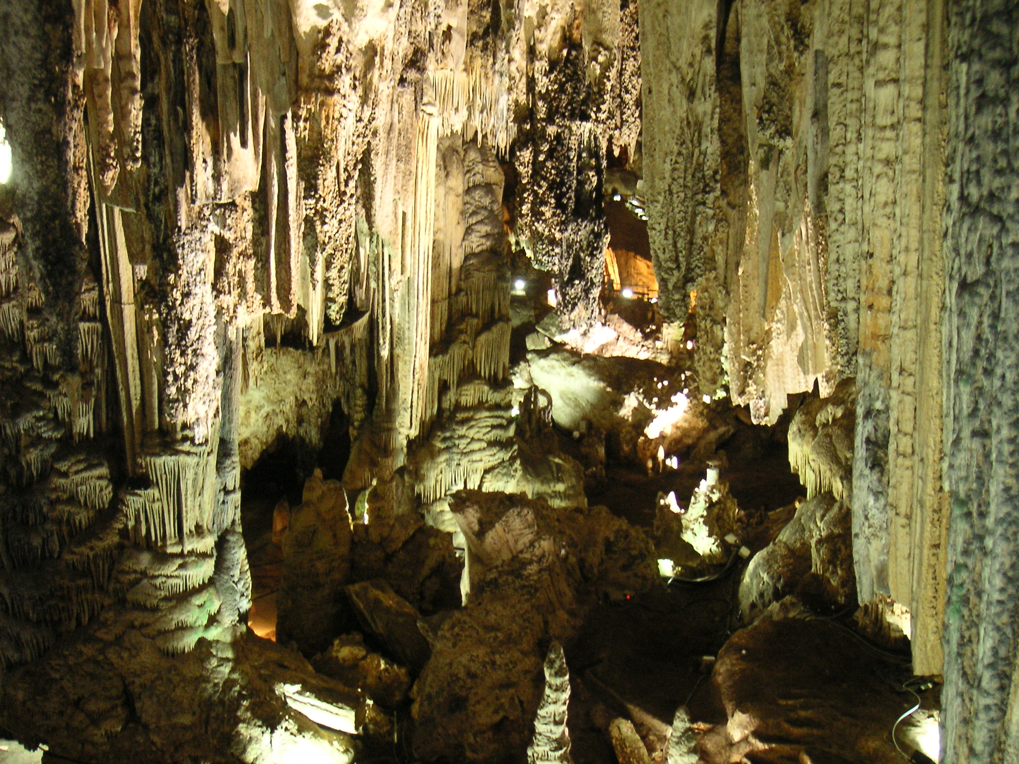 Cuevas de Nerja